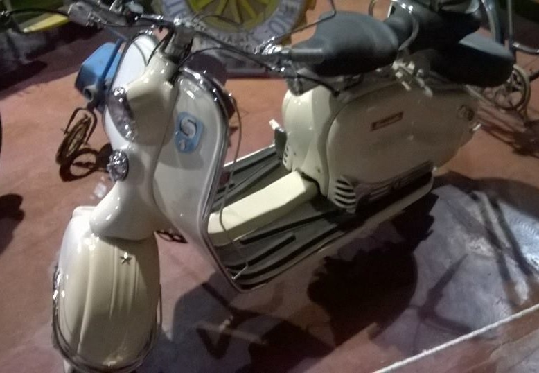 Siambretta 125 De Lujo, fabricada por Siam Di Tella bajo licencia de Lambretta. Expuesta en el Museo del Automóvil y del Ayer en Maipú, Mendoza.